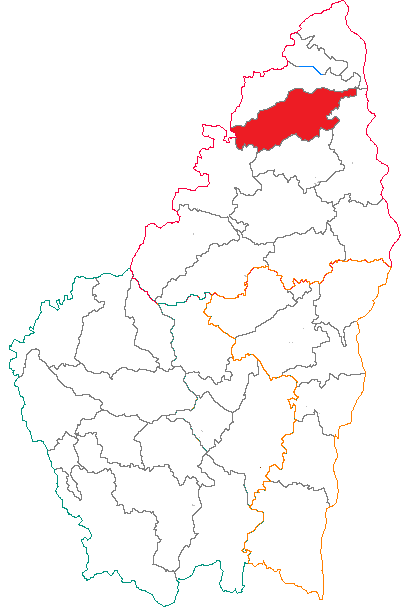 Situation du canton dans le département de l'Ardèche (France)